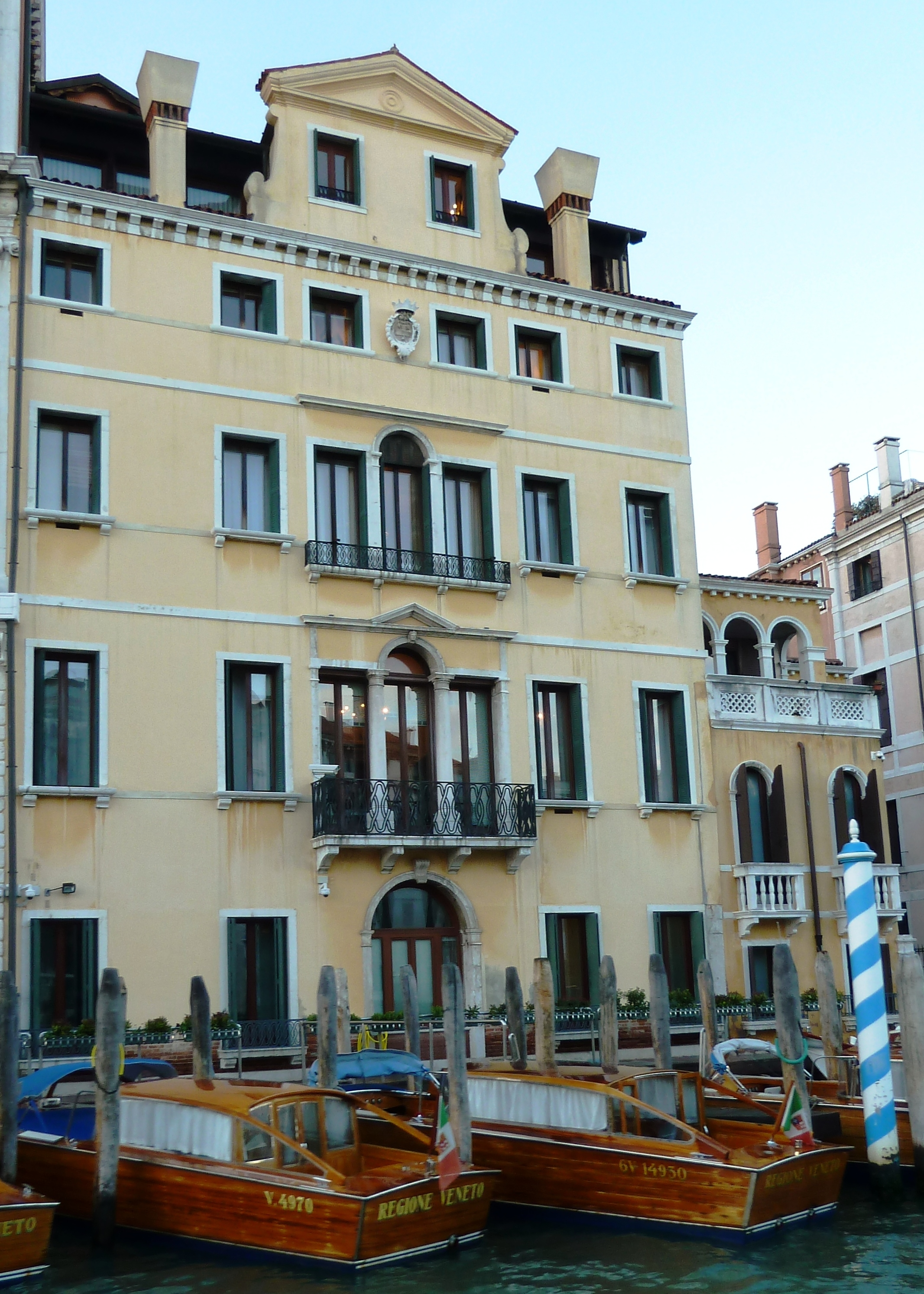 Pal caotorta angaran gran canal